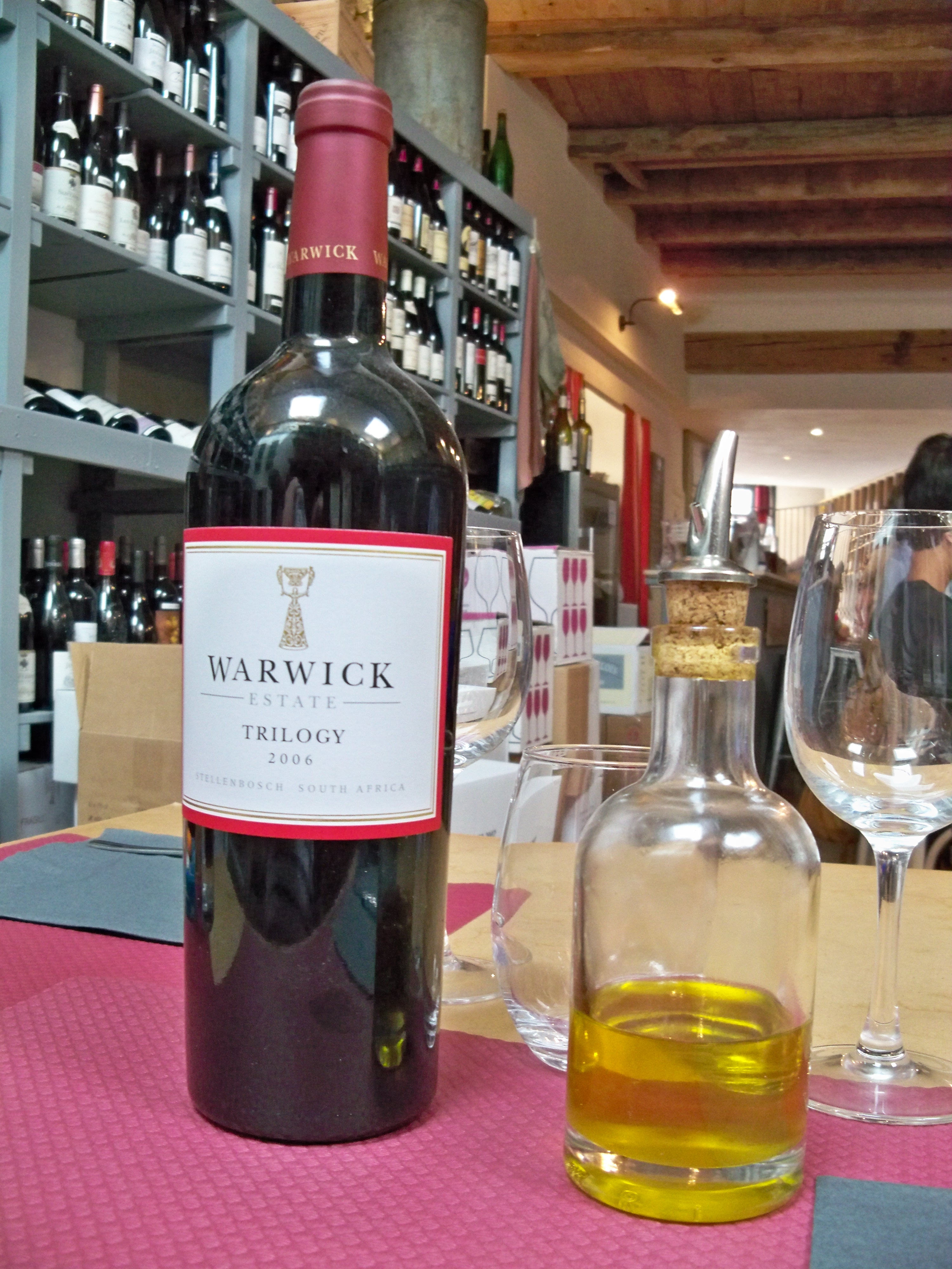 vin d'Afrique du Sud